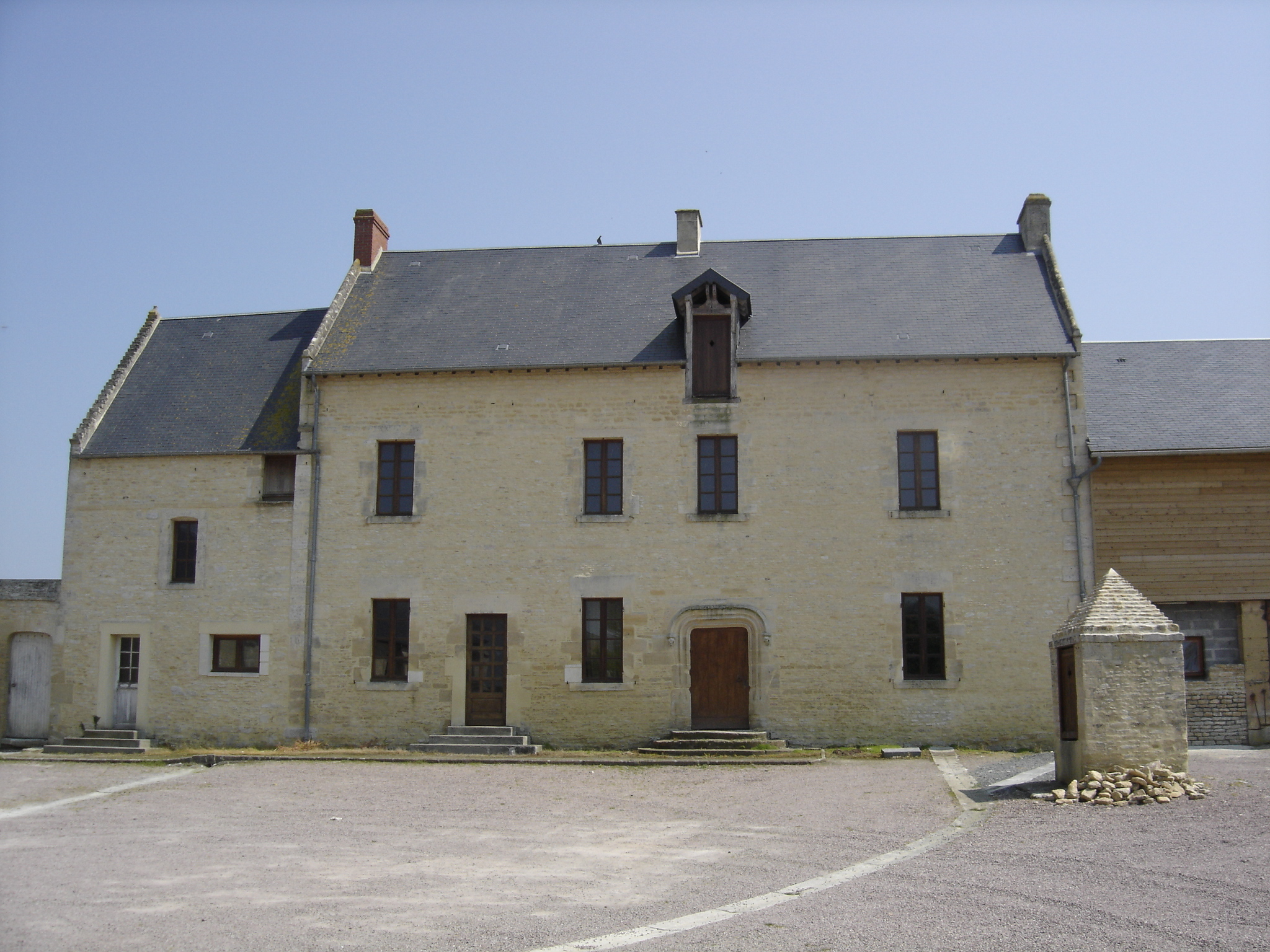 maison ancienne achetée par la mairie